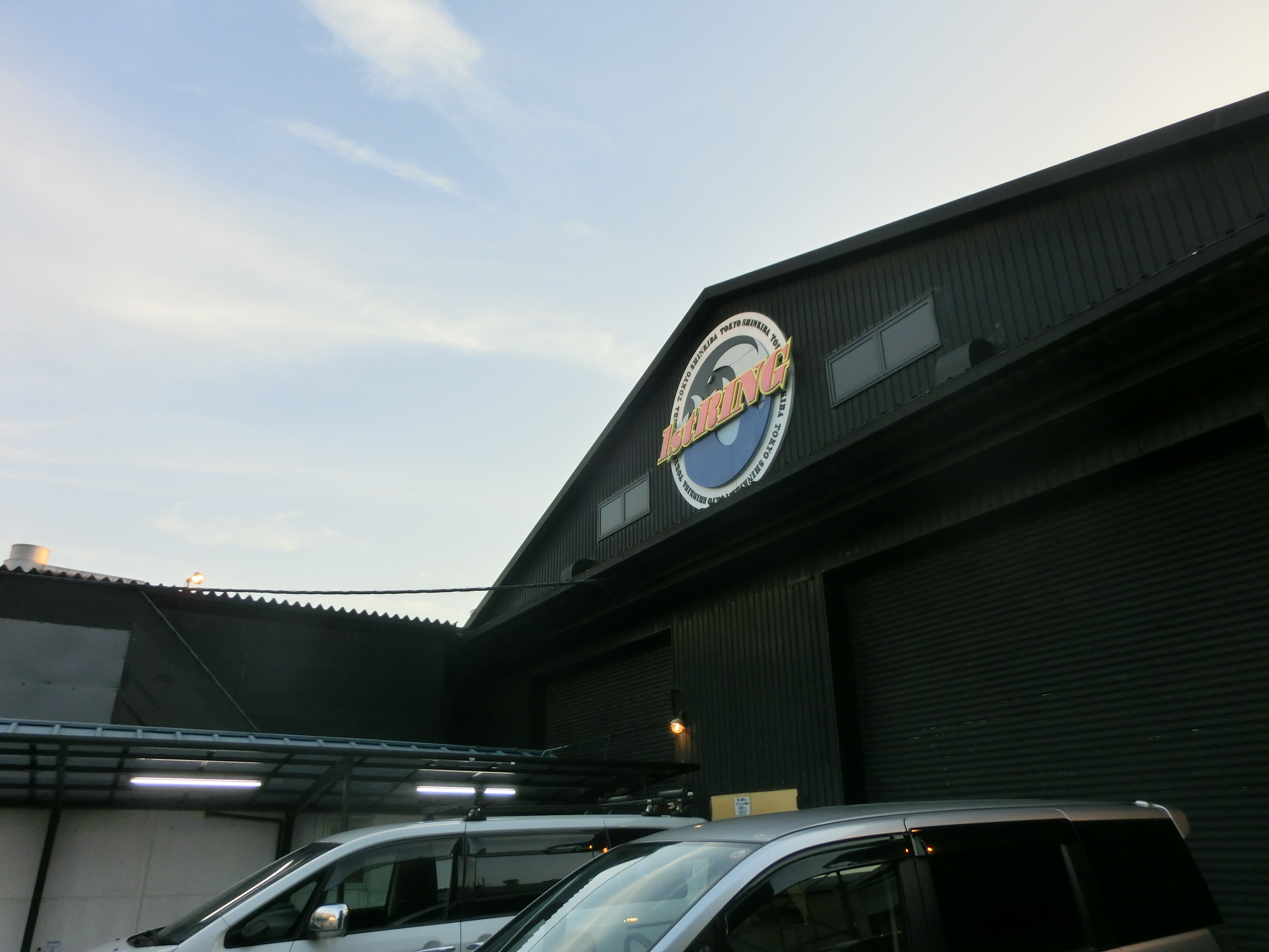 新木場風景2016